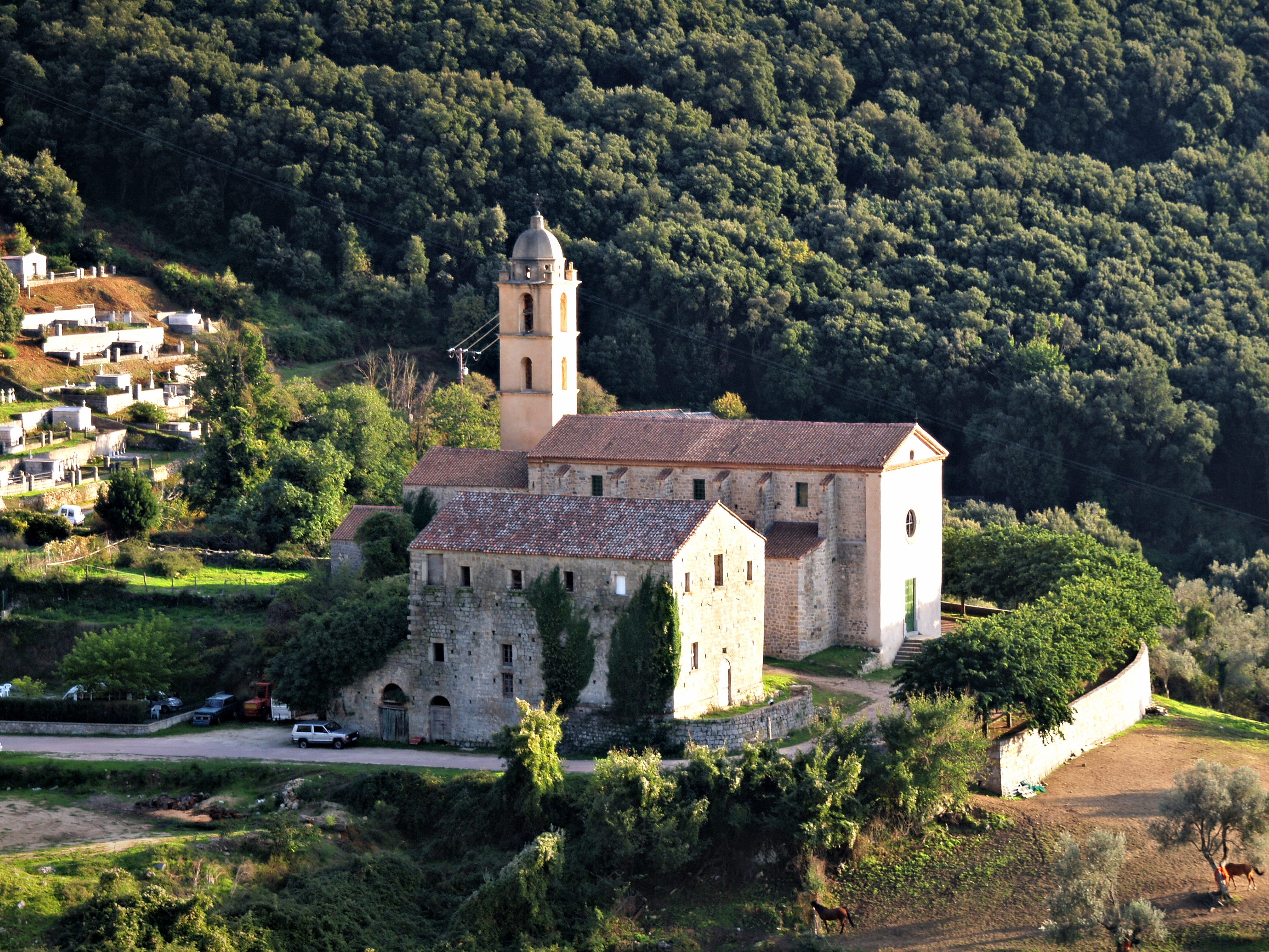 Sainte-Lucie-de-Tallano, Alta Rocca (Corse) - Couvent Saint-François (désaffecté) et l'église conventuelle